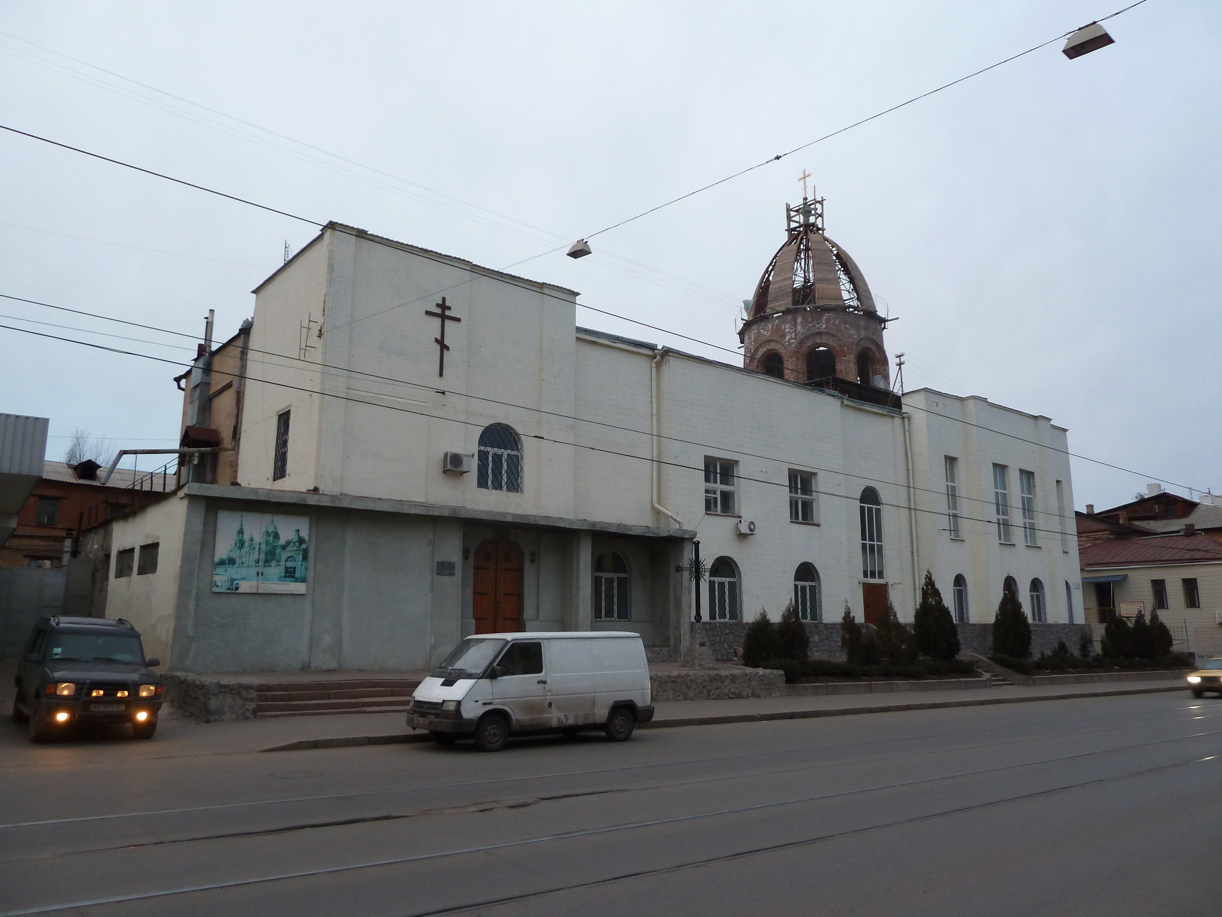 Харьков, улица Полтавский Шлях, дом 44